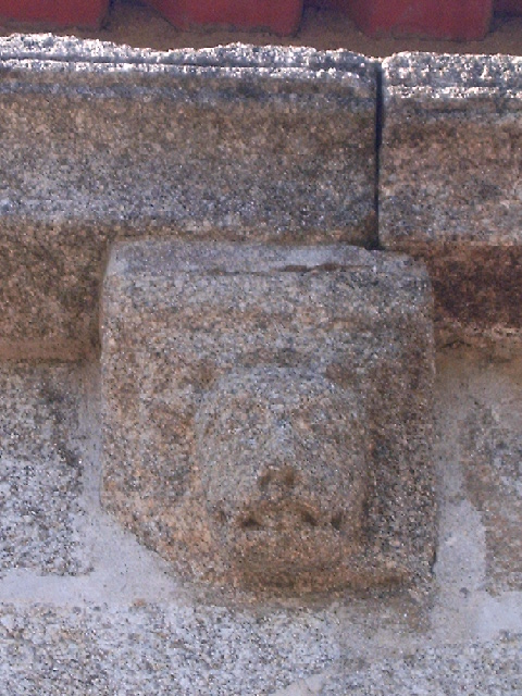 Cachorro (elemento arquitectónico) na Domus Municipalis, Bragança